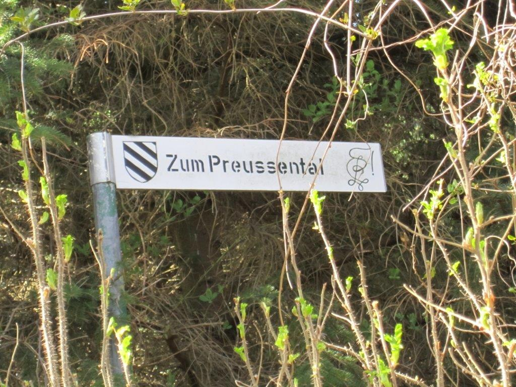 Hinweisschild auf die Angehörigen des Corps Borussia Tübingen, die jahrzehntelang an der Bepflanzung des Dünenfriedhofs Langeoog mitgearbeitet haben.